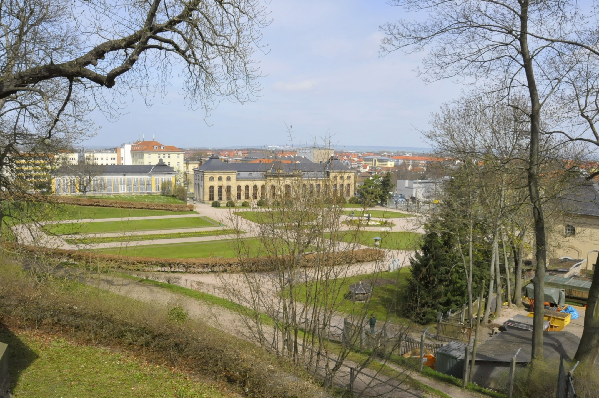 Gotha, Orangerie vom Teeschlösschen aus gesehen